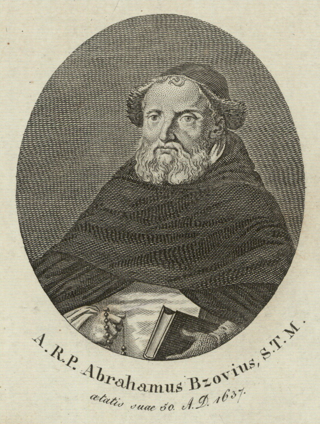 A.R.P. Abrahamus Bzovius, S.T.M. aetatis suae 50 A.D. 1637, miedzioryt Sebastiana Langera, 1819 rok.